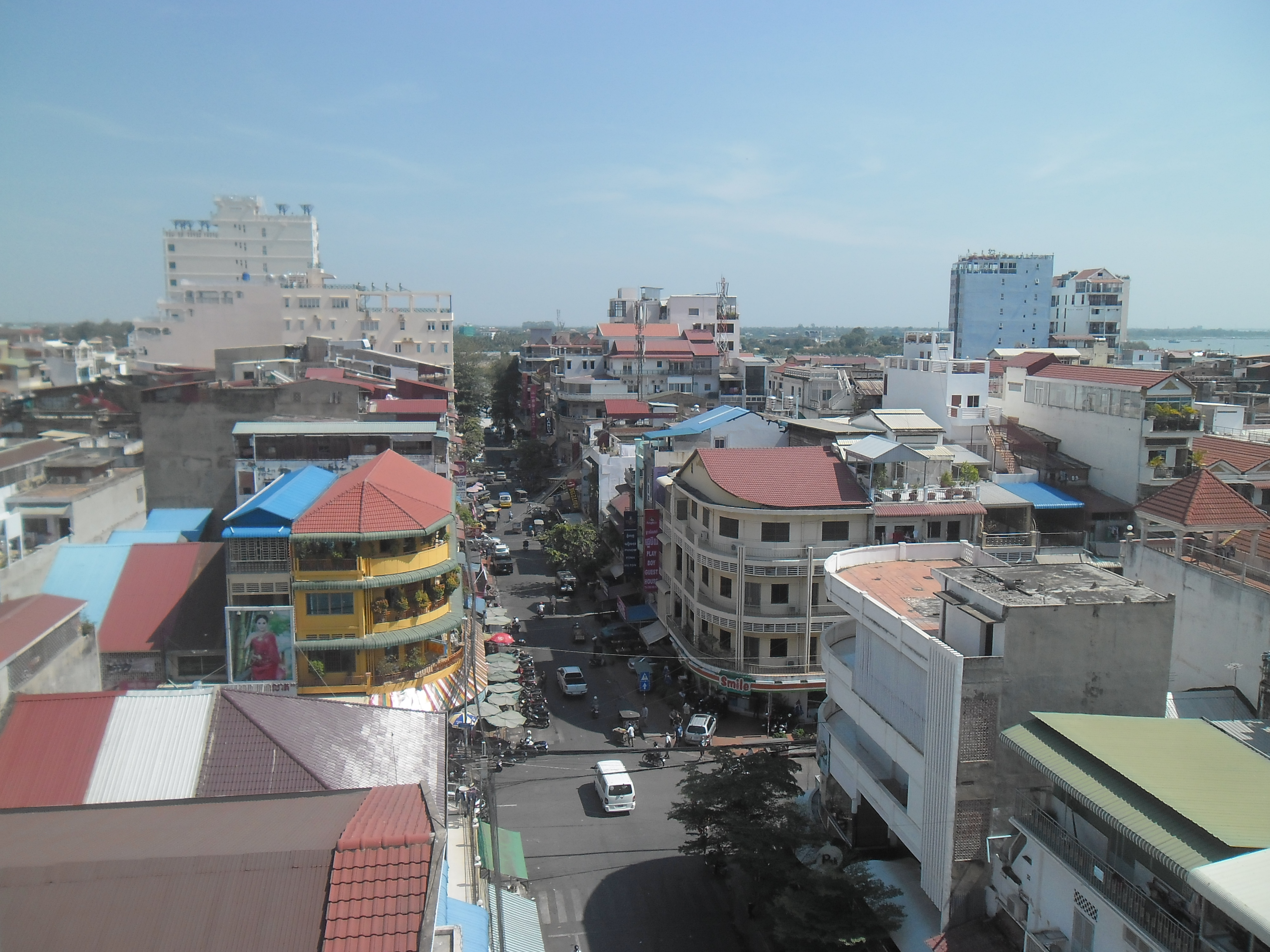 Phnom Penh